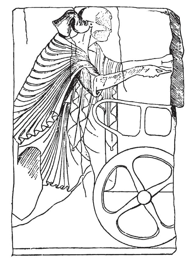 Panathenischer Sieger